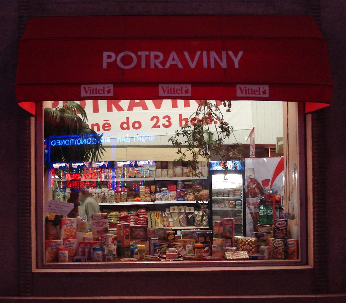 épicerie a Prague, rue Na Poříčí.